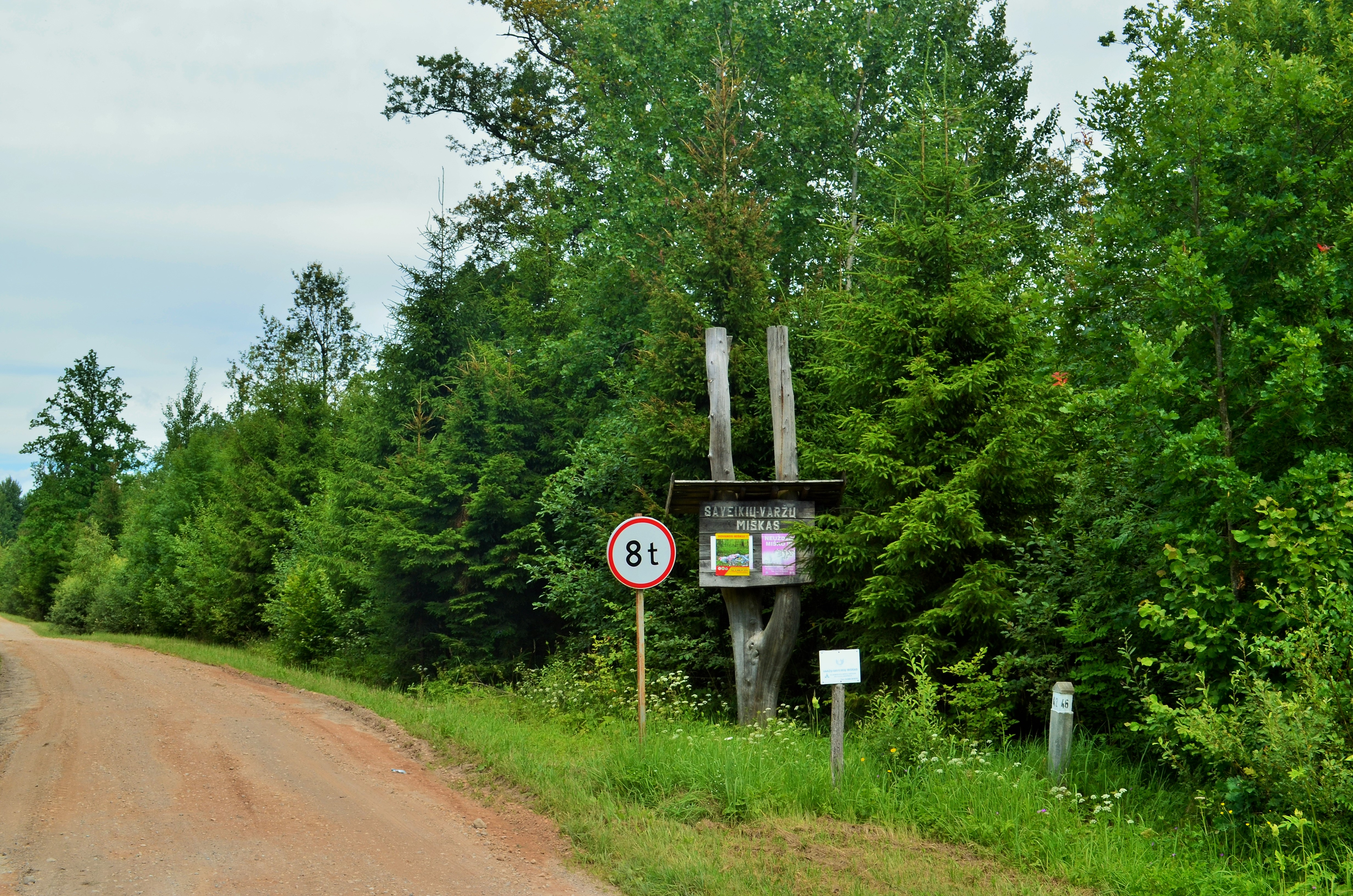 Saveikių (arba Seveikių)-Varžų miškas prie Seveikių, Ukmergės raj.